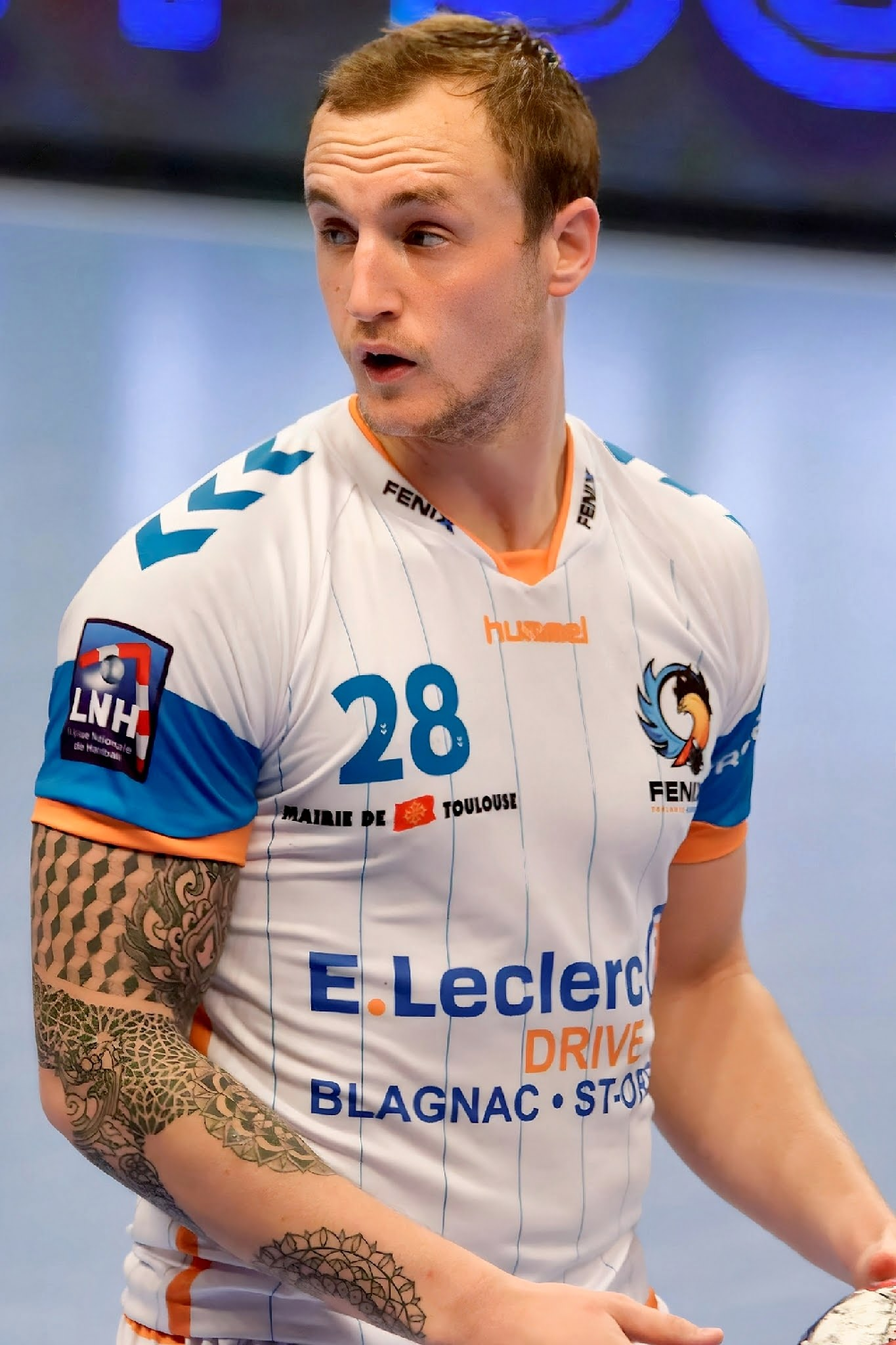 PSG Handball / Toulouse Fenix Handball lors de la 21e journée du championnat de France de handball masculin le 16 avril 2016 au stade Pierre de Coubertin à Paris.